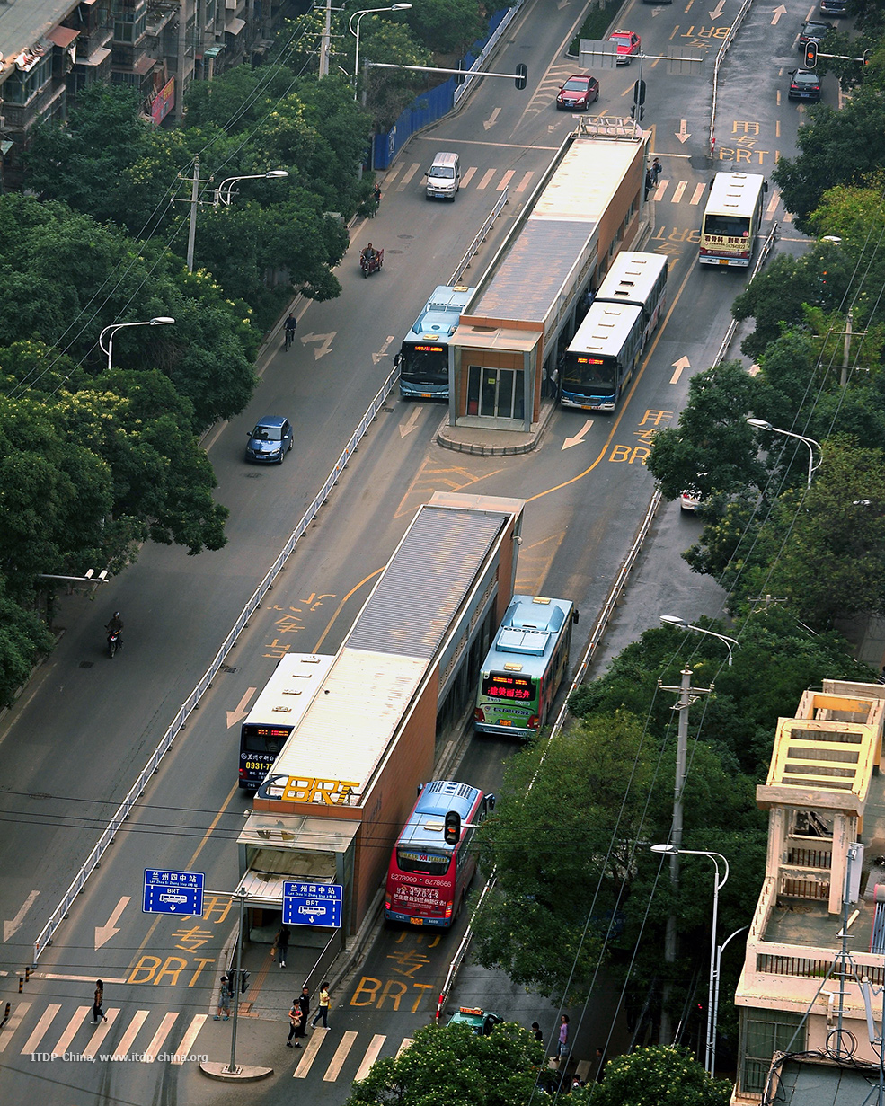 兰州BRT四种站